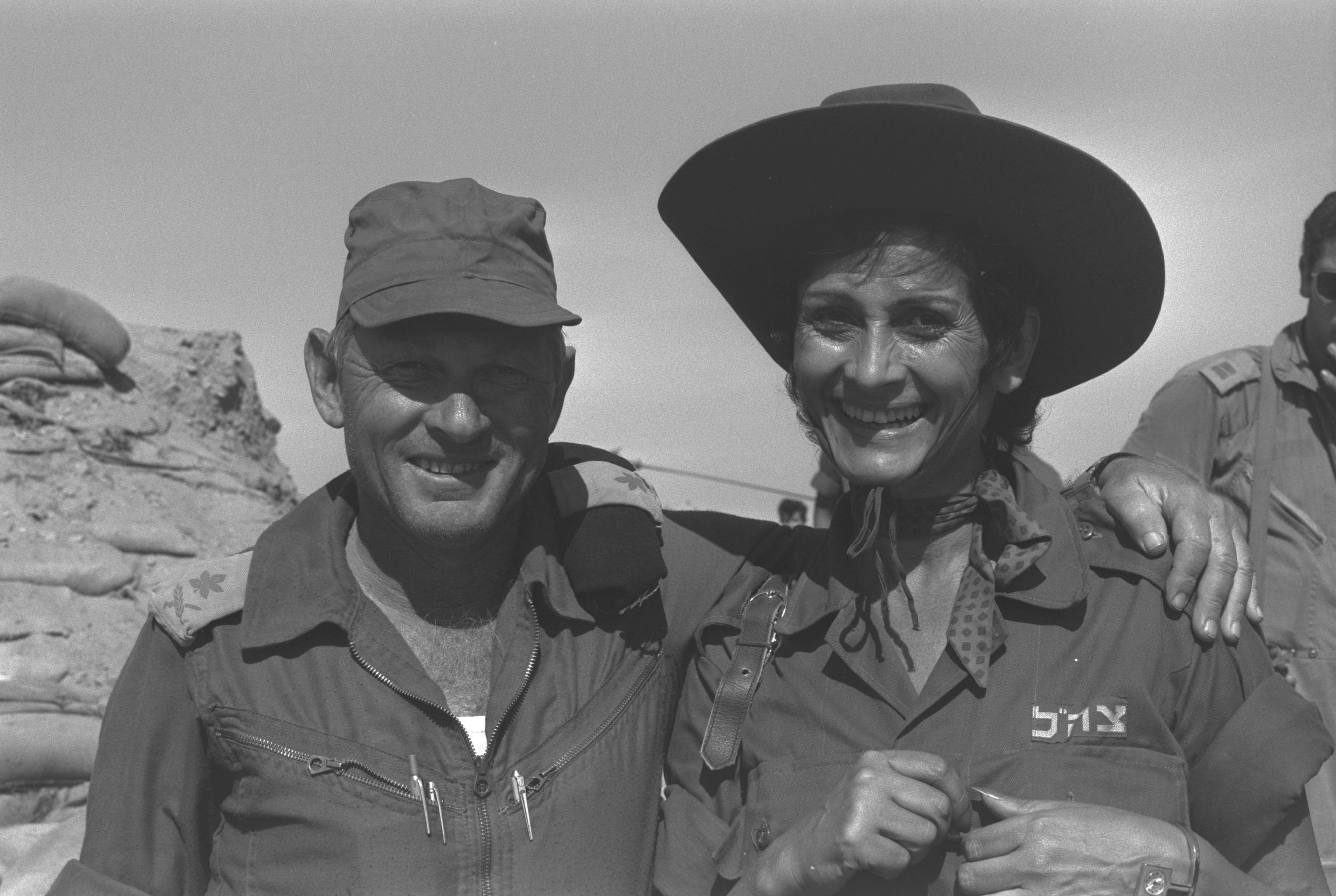 SINGER YAFFA YARKONI WITH ALUF AVRAHAM ADAN, NEAR THE SUEZ CANAL, THE SOUTHERN COMMAND. הזמרת יפה ירקוני ואלוף אברהם אדן ליד תעלת סואץ